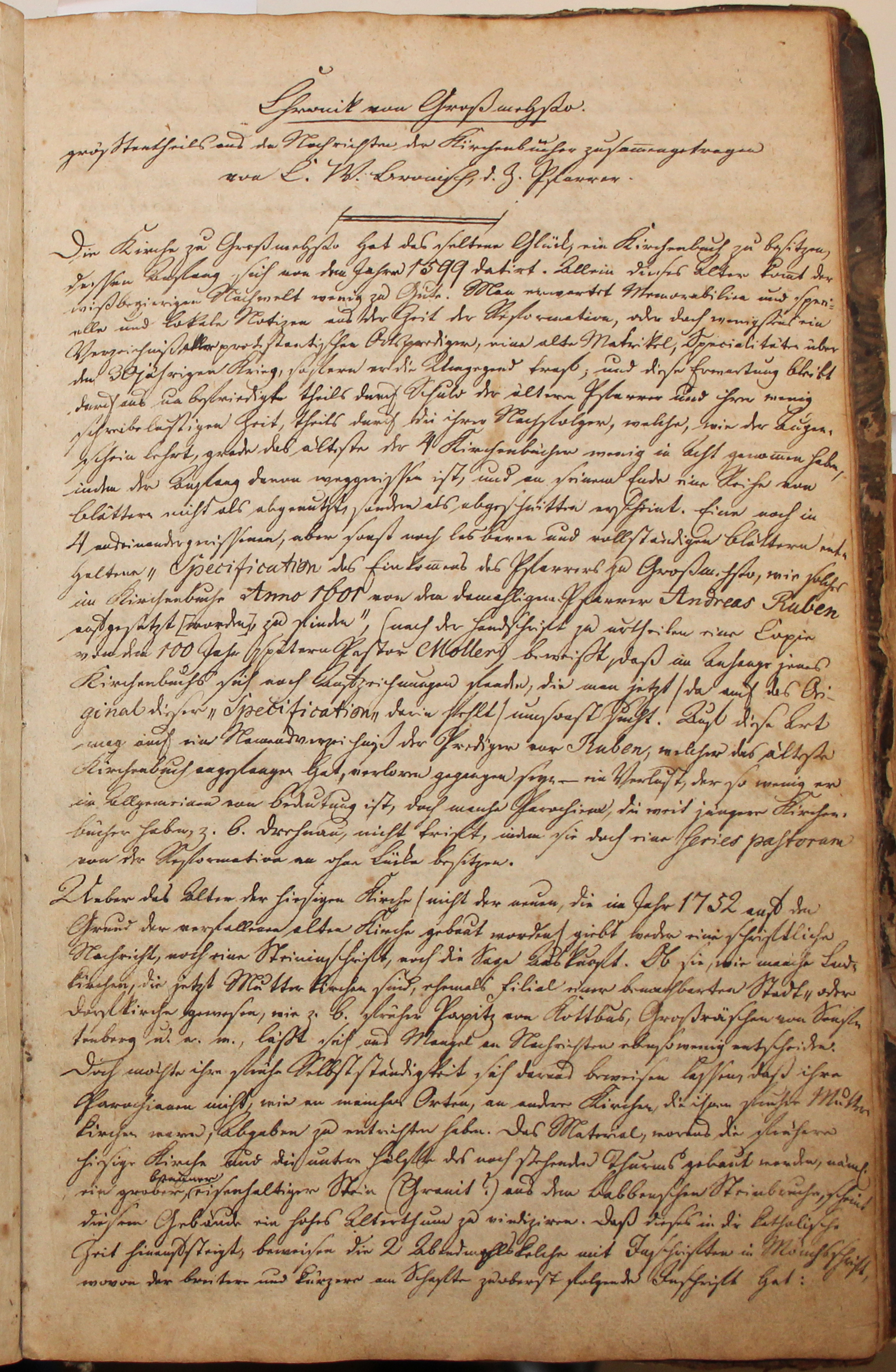 Chronik von Großmehßo, originale Niederschrift von Christian Wilhelm Bronisch.